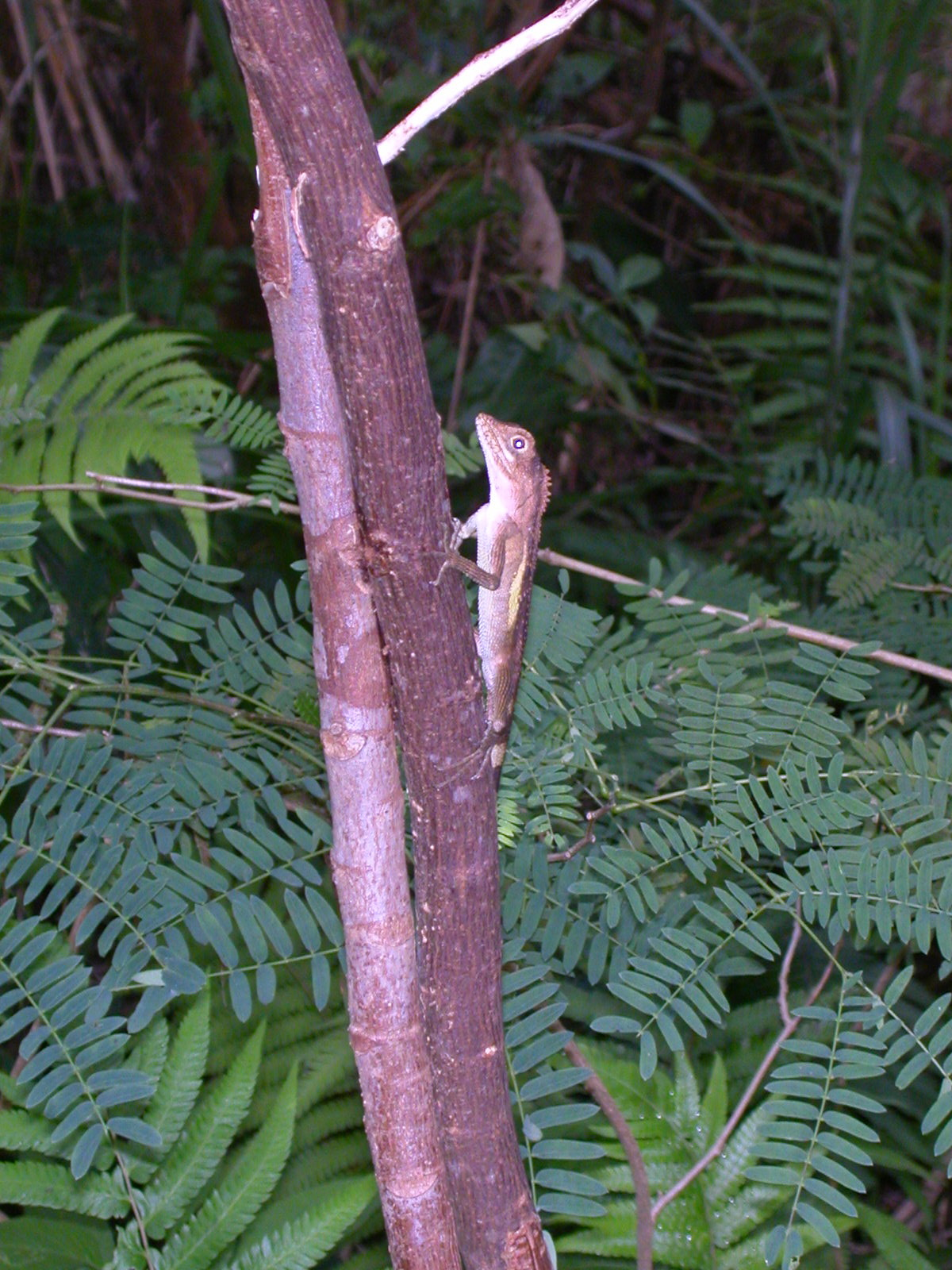 サキシマキノボリトカゲ。撮影地: 西表島。